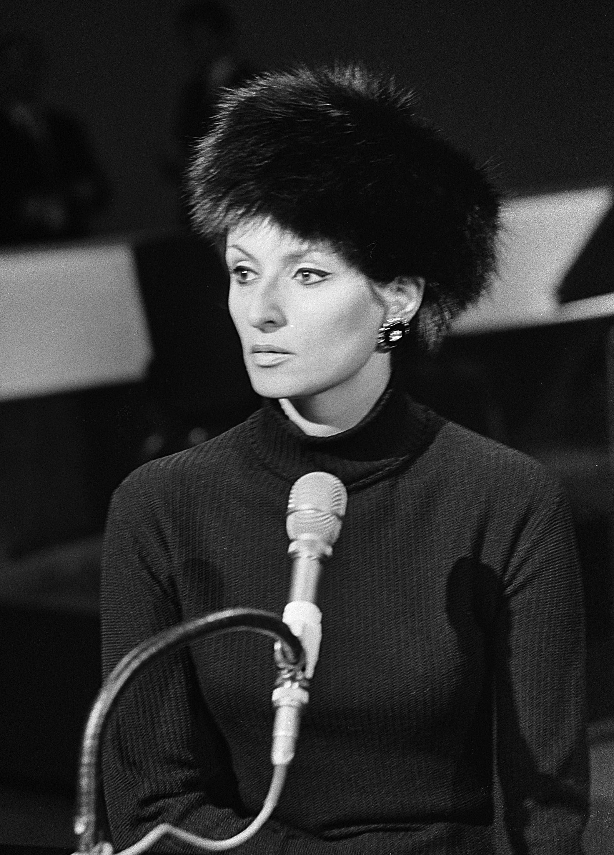 Barbara tijdens repetities voor het Grand Gala du Disque Populaire 1968